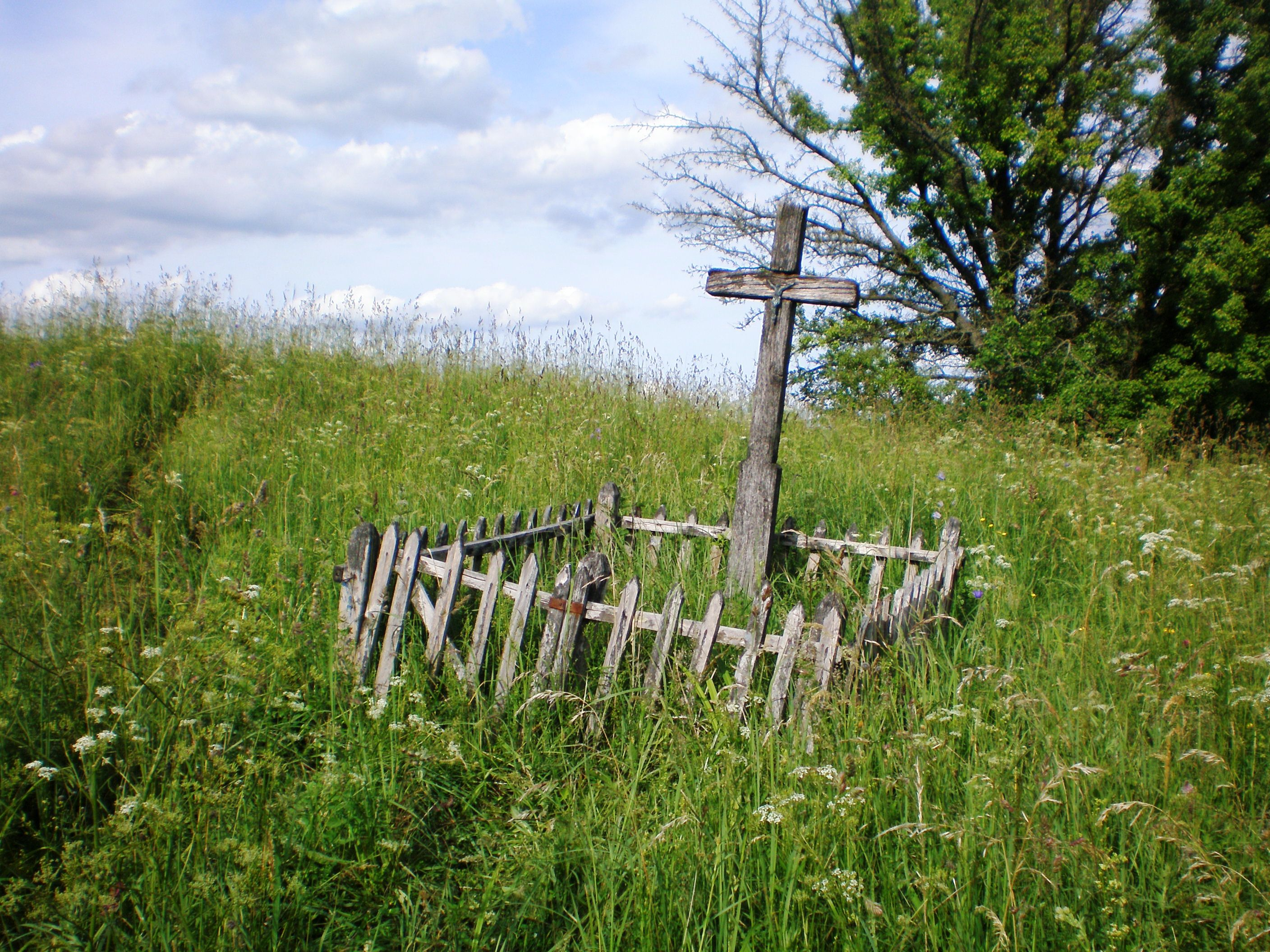 Vaidatonių piliakalnis, Surviliškio sen., Kėdainių raj.